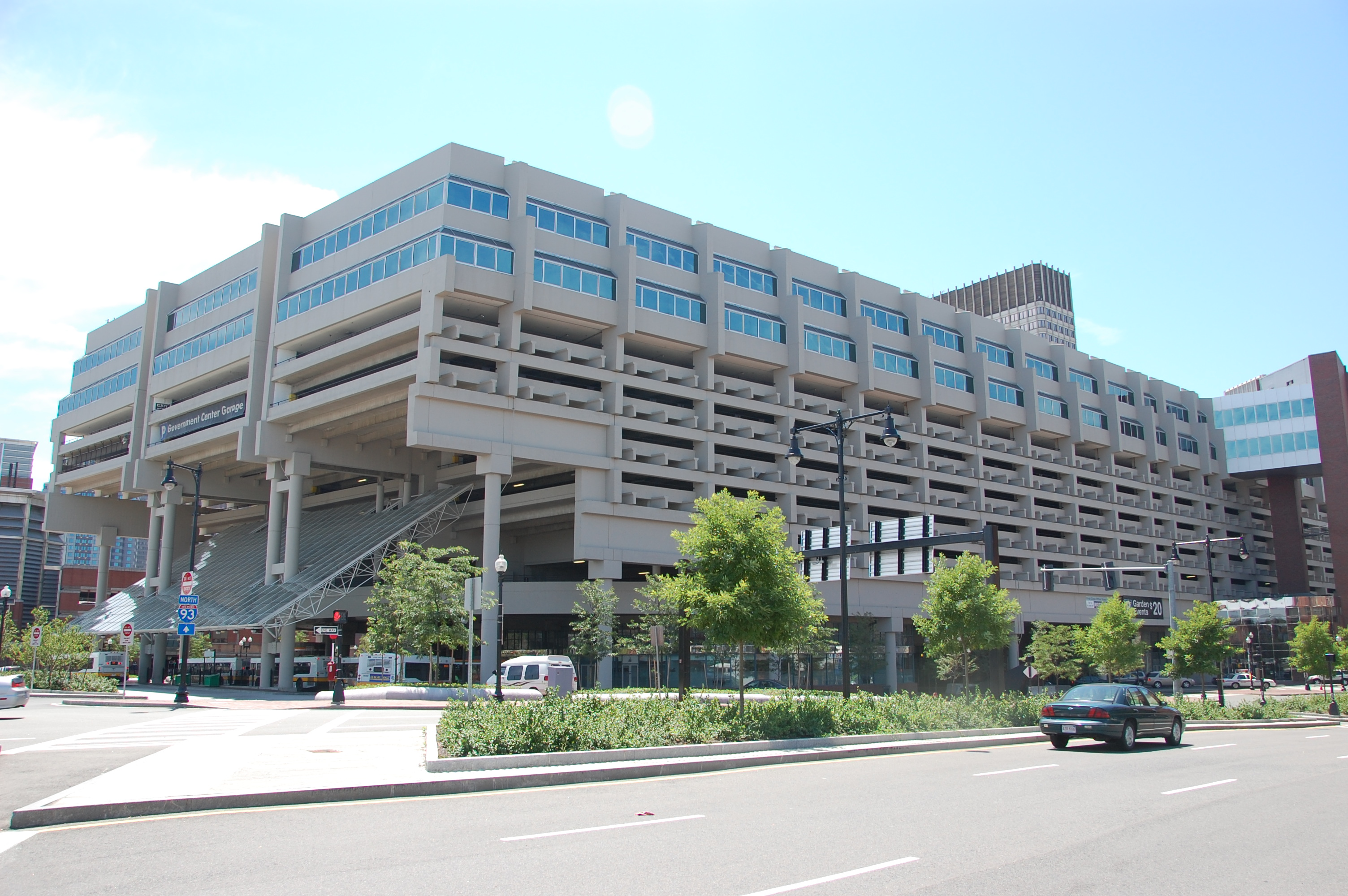 Govt Center Garage